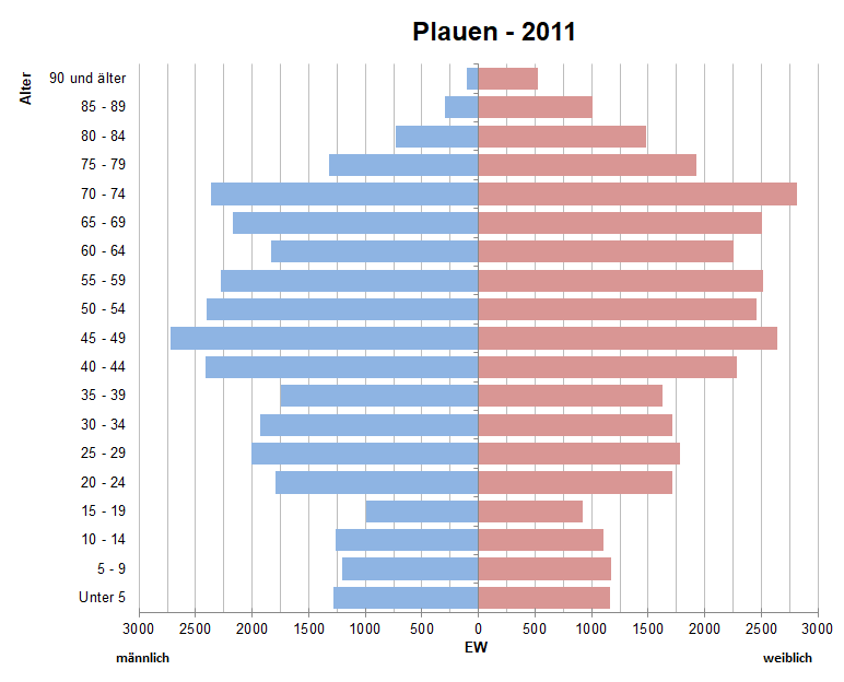 Bevölkerungspyramide der Stadt Plauen nach Zensus 2011.